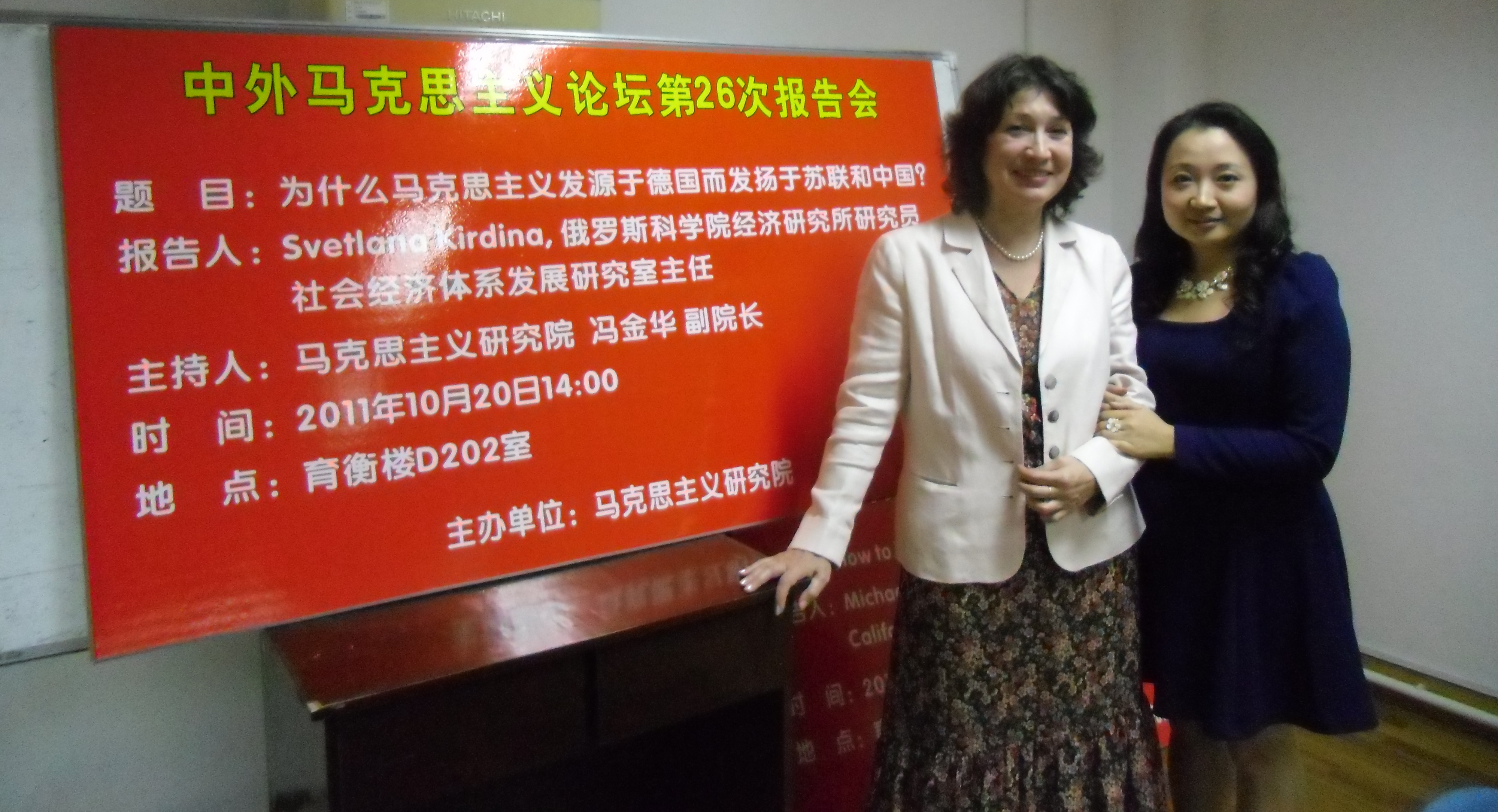 kirdina in china